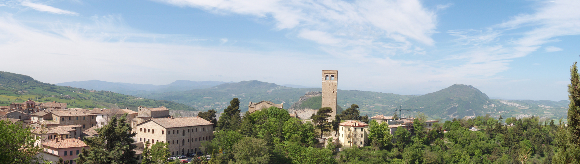 San Leo, Emilia-Romagna, Italia